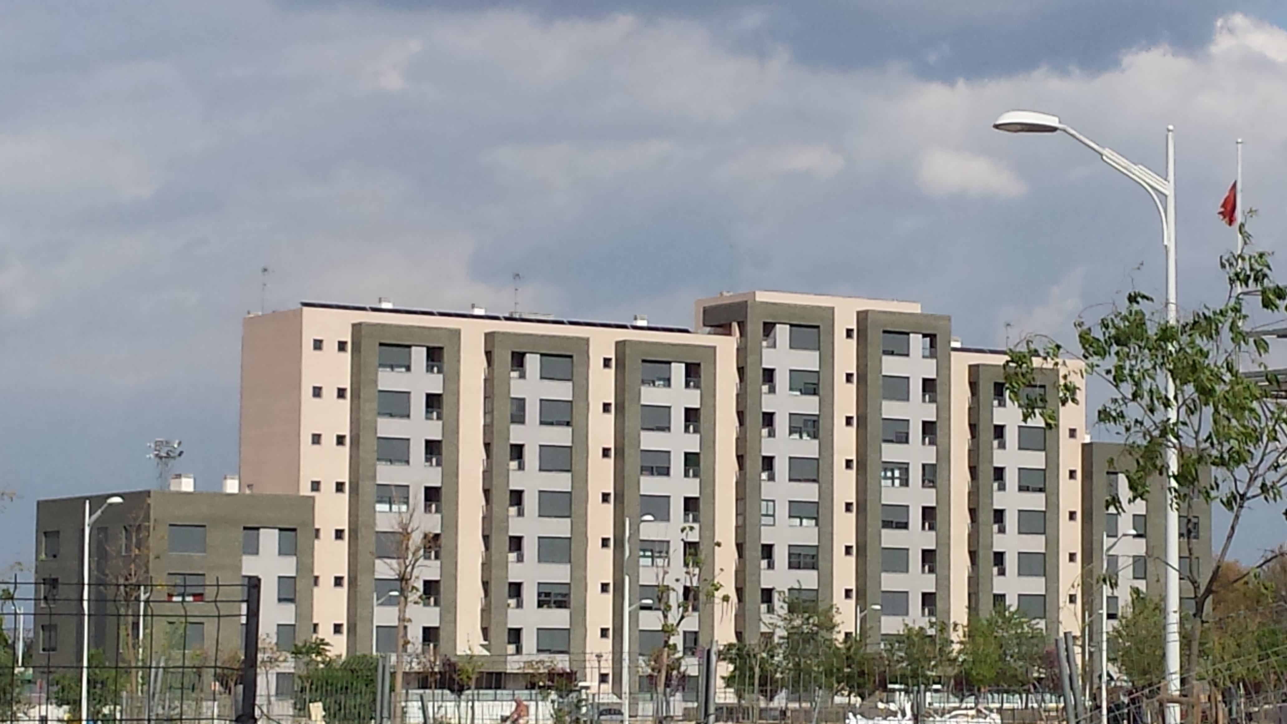 Nuevo bloque de viviendas Barrio Nuestra Señora de Cubas Albacete